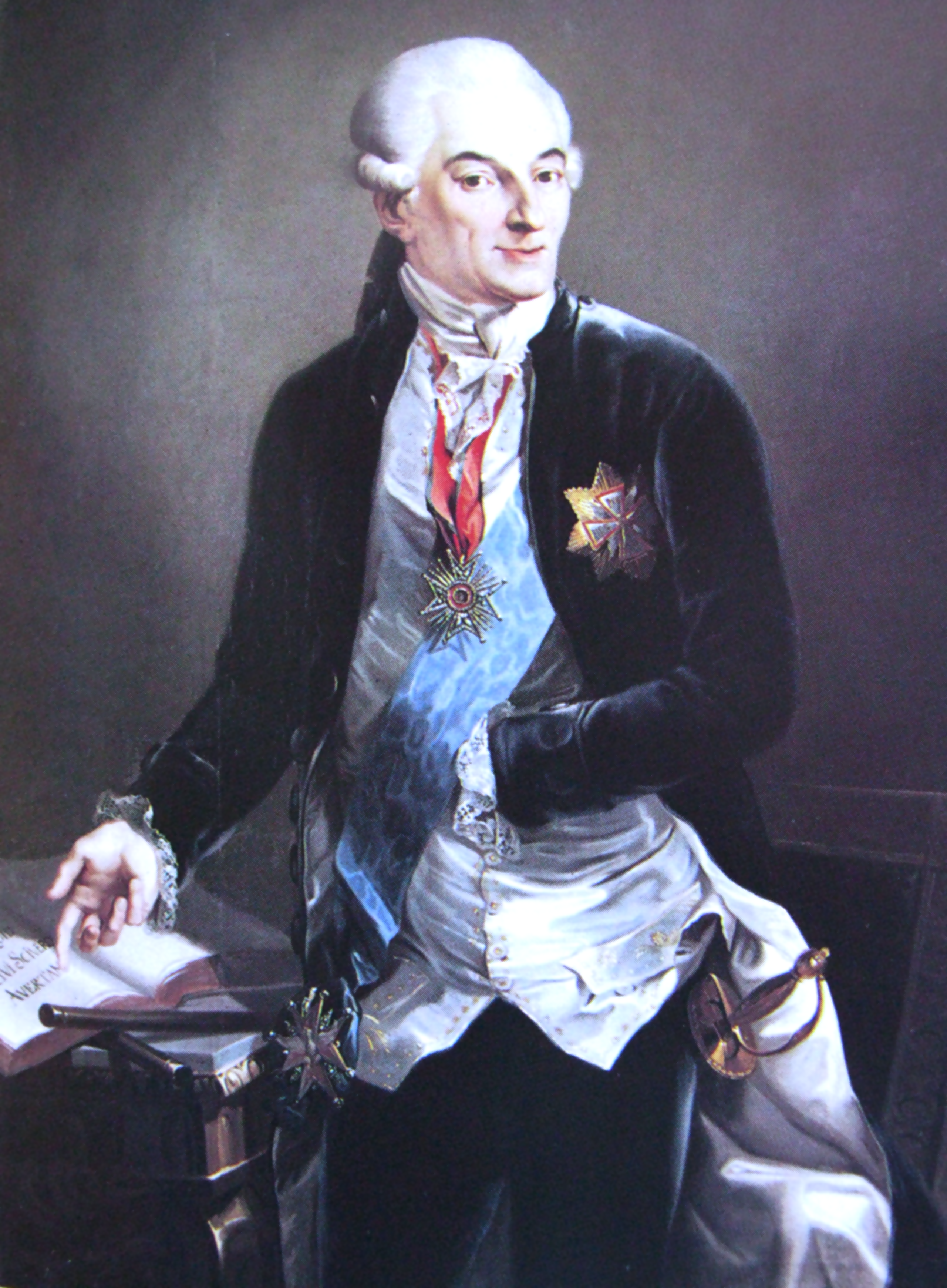 Portrait of Antoni Barnaba Jabłonowski